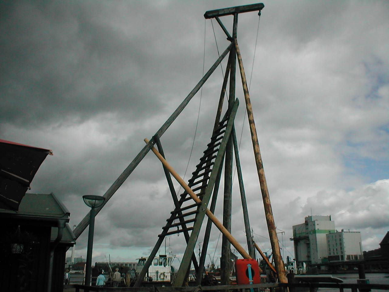 historischer Kran